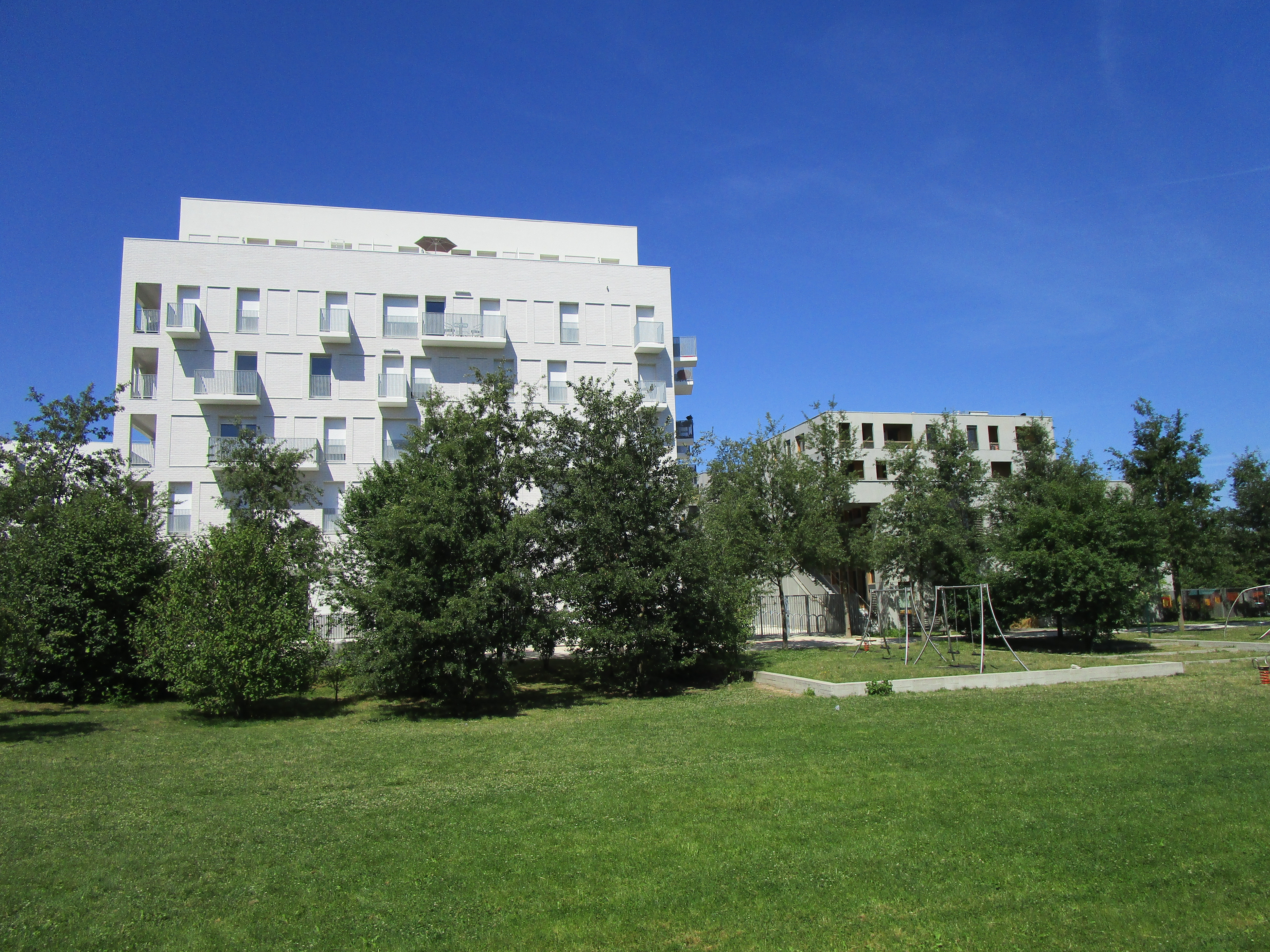 Vue du jardin de la Grenouillère et de la place Pierre Gandet, au cœur du quartier Monconseil, à Tours Nord.